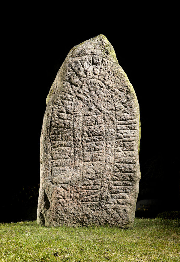 Foto: nationalmuseet ved Roberto Fortuna